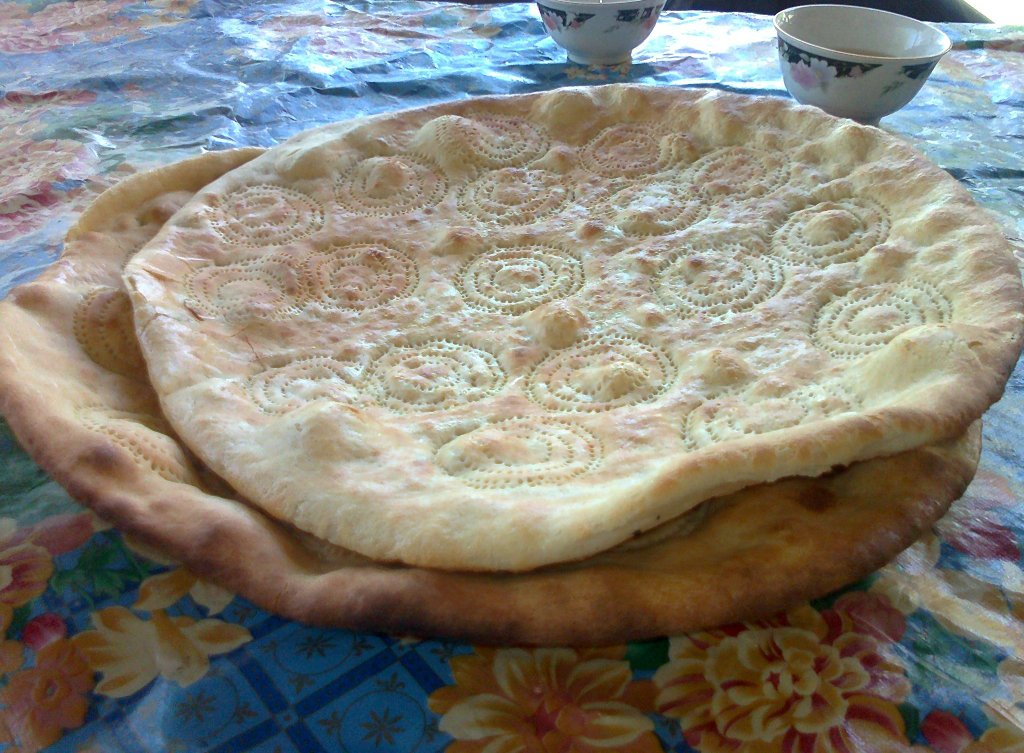 Хорезмский нан (хлеб) или Хорезмский патыр-нан, Хорезм, Узбекистан